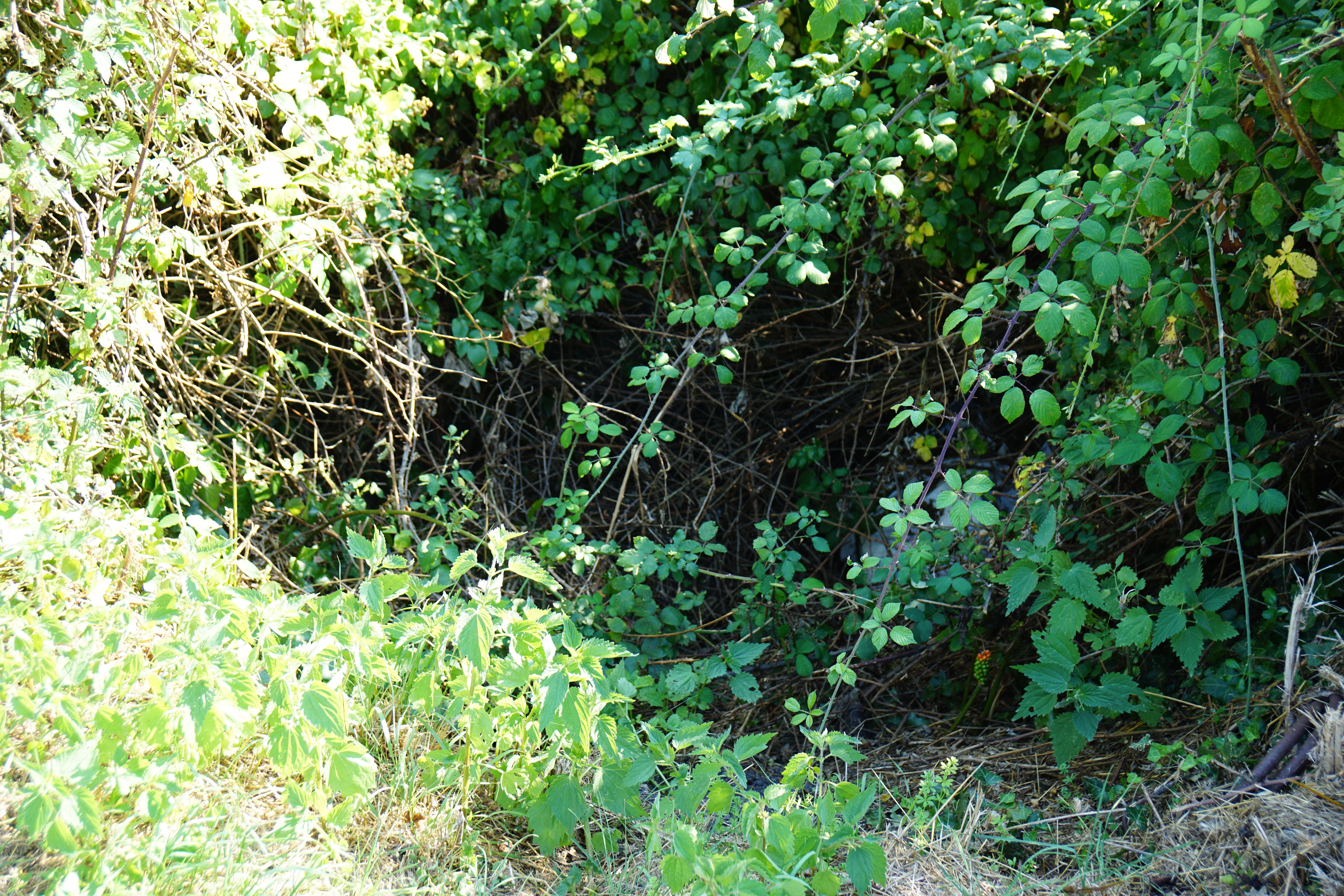 Emplacement du puits d'aérage du site des Malécots, mine de charbon du XXe siècle restaurée avec un chevalement en bois restauré.